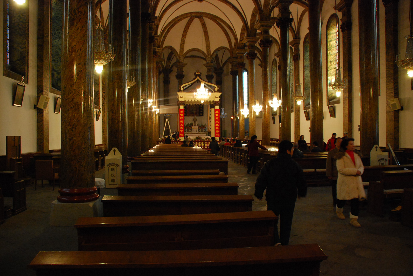 东堂大堂